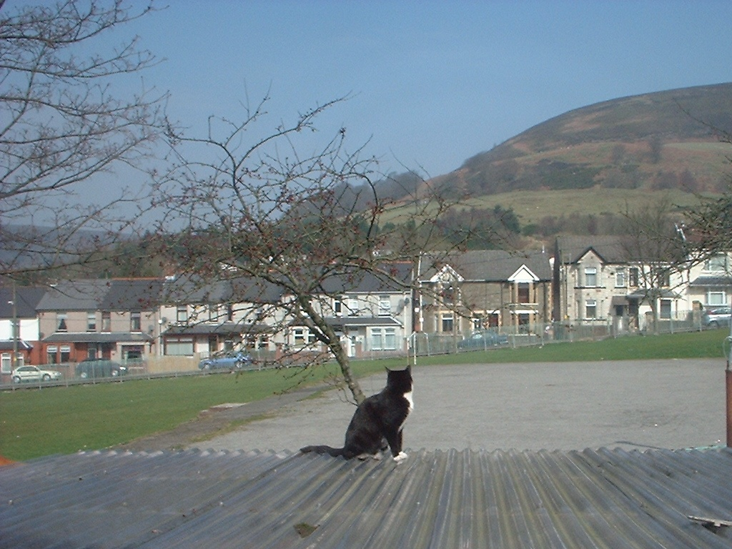 Golwg o gefn Stryd Adda, Abertyleri, Cymru